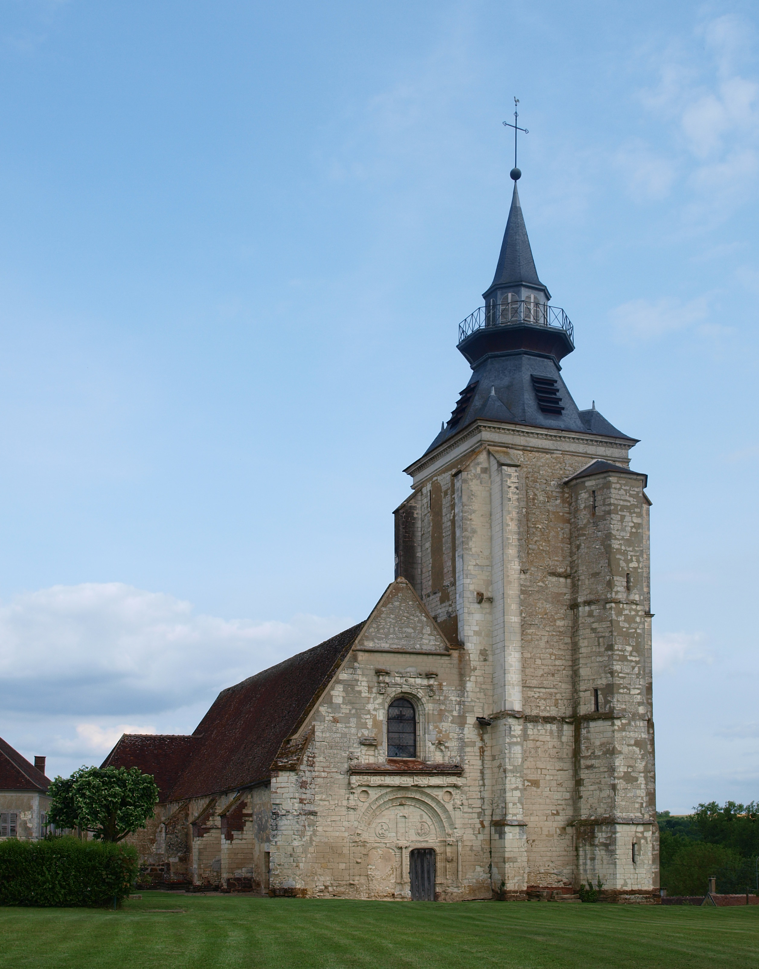 Poilly-sur-Tholon (Yonne, France) ; église